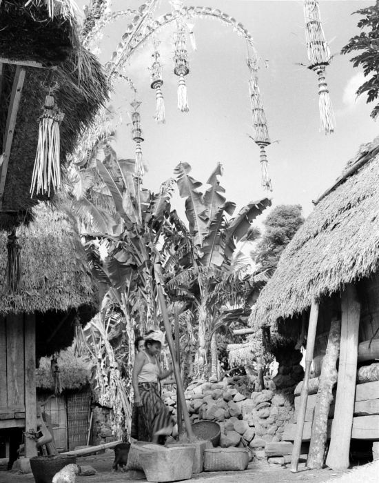 Negatif. Panen padi telah tiba, lumbung dihiasi dengan penjor-penjor yang terbuat dari bambu dan dihiasi dengan berbagai hiasan dari padi dan bunga-bungaan. Dua perempuan tampak sibuk menumbuk padi. Bali